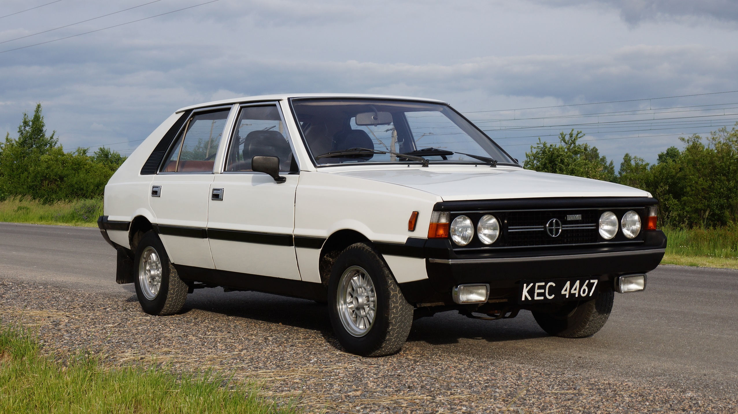 FSO Polonez 1978r